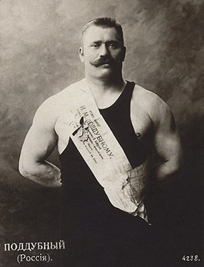 Ivan Poddubny (1871-1949)